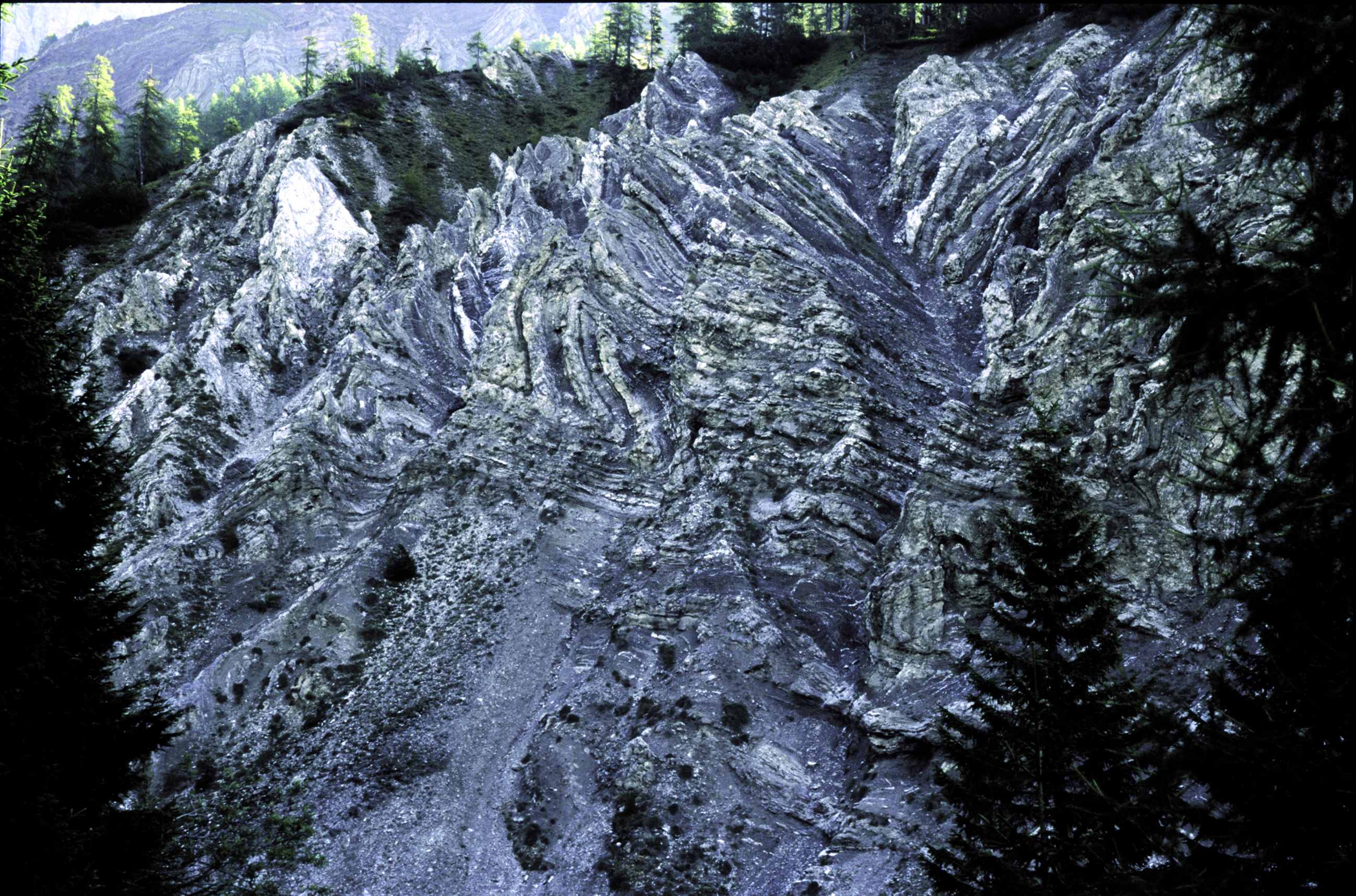 Pieghe Belleophon